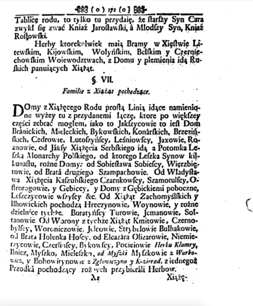 Józef Aleksander Jabłonowski о происхождении Немиричей от князей Захомыльских и Илговицких (Heraldica: to iest osada kleynotow rycerskich y wiadomość Znaków Herbownych ...S. 172)